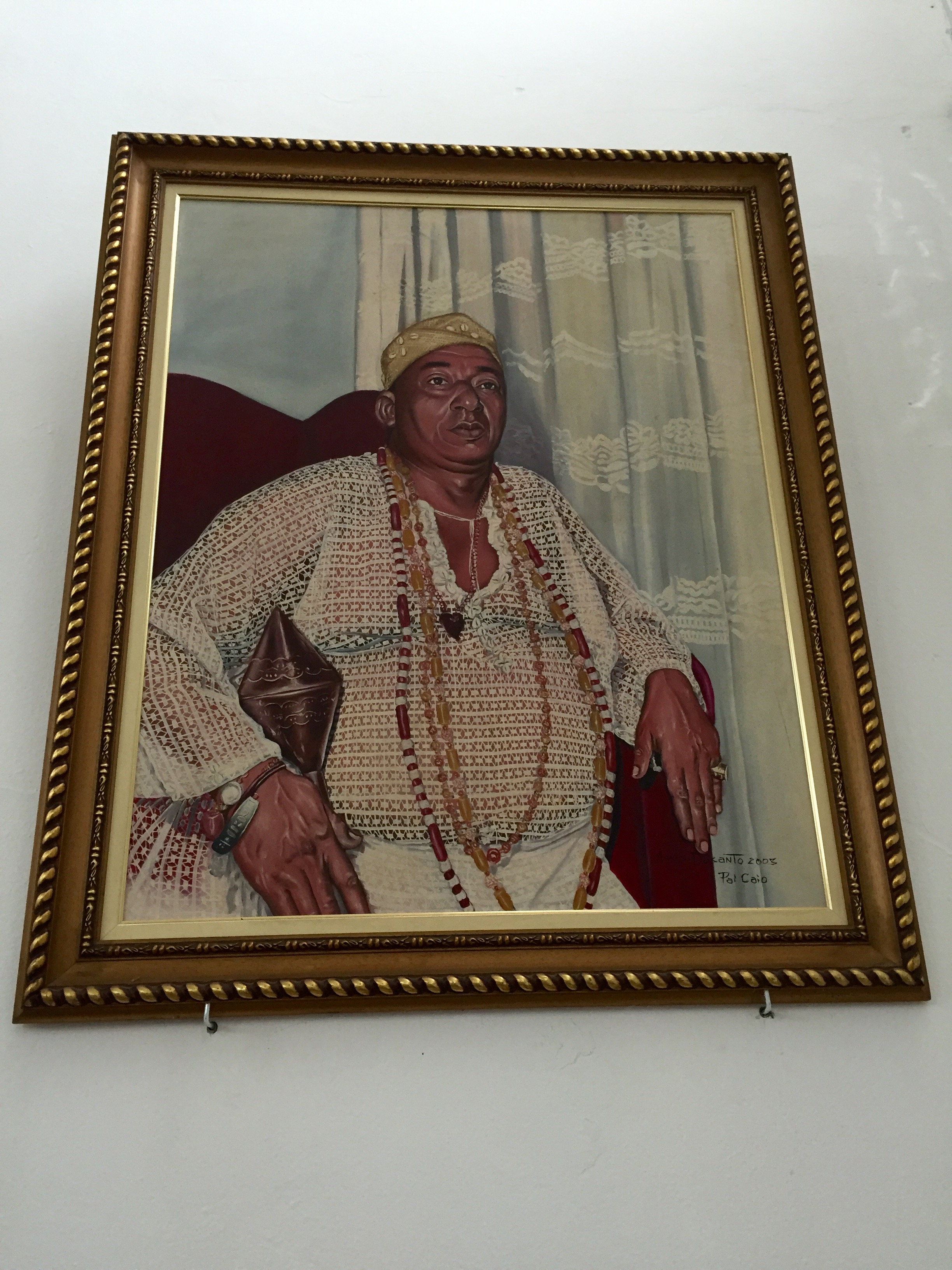 Quadro retratando o Pai Caio de Xangô, condutor da primeira geração do Axé Ilê Obá, nos anos 50, em São Paulo (SP), Brasil.